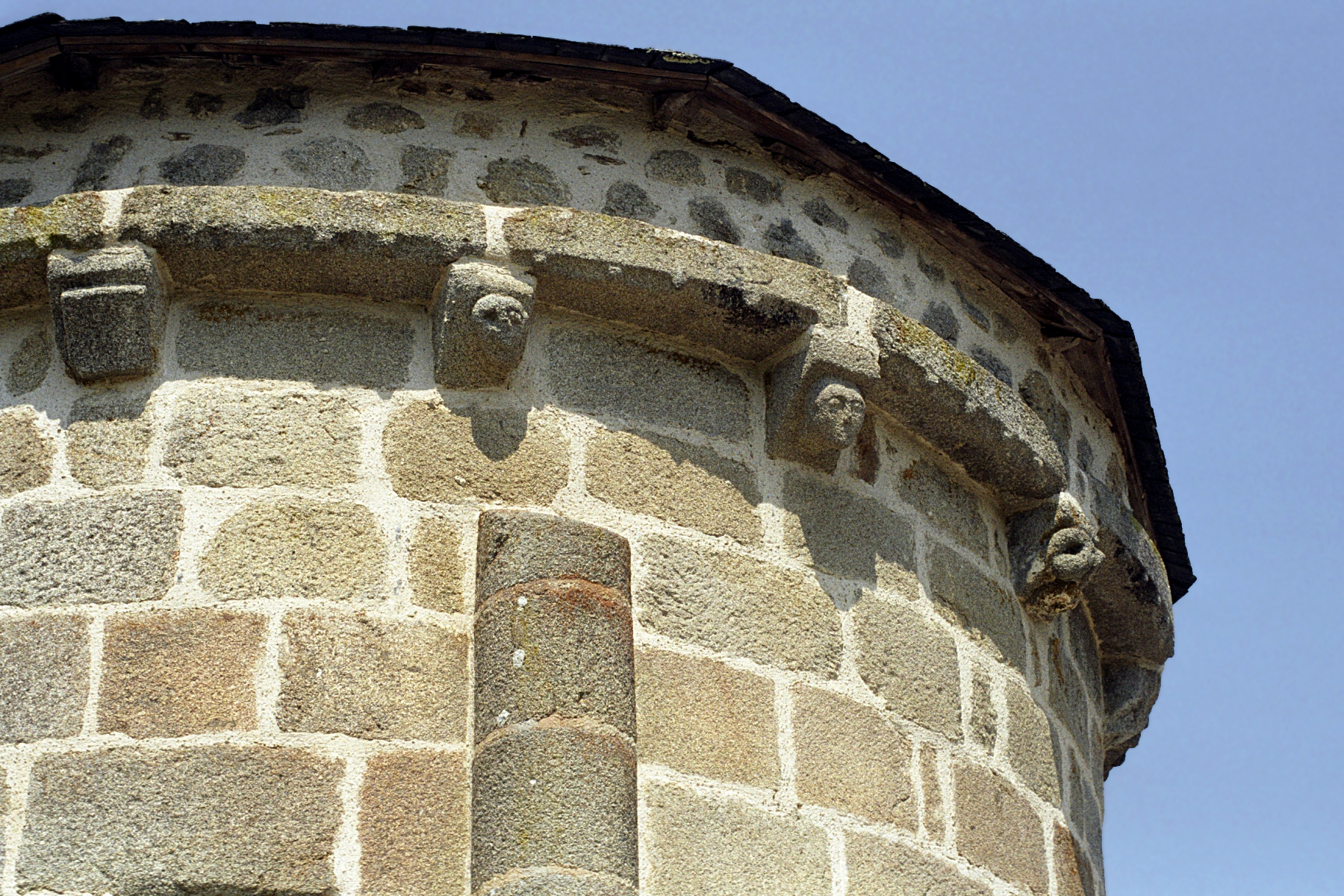 France - Corrèze - Église Saint-Étienne de Saint-Étienne-la-Geneste